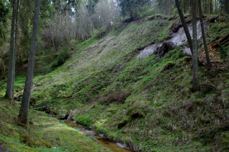 Šlavės atodanga pakeliui į Puntuką pėsčiųjų, dviračių keliu